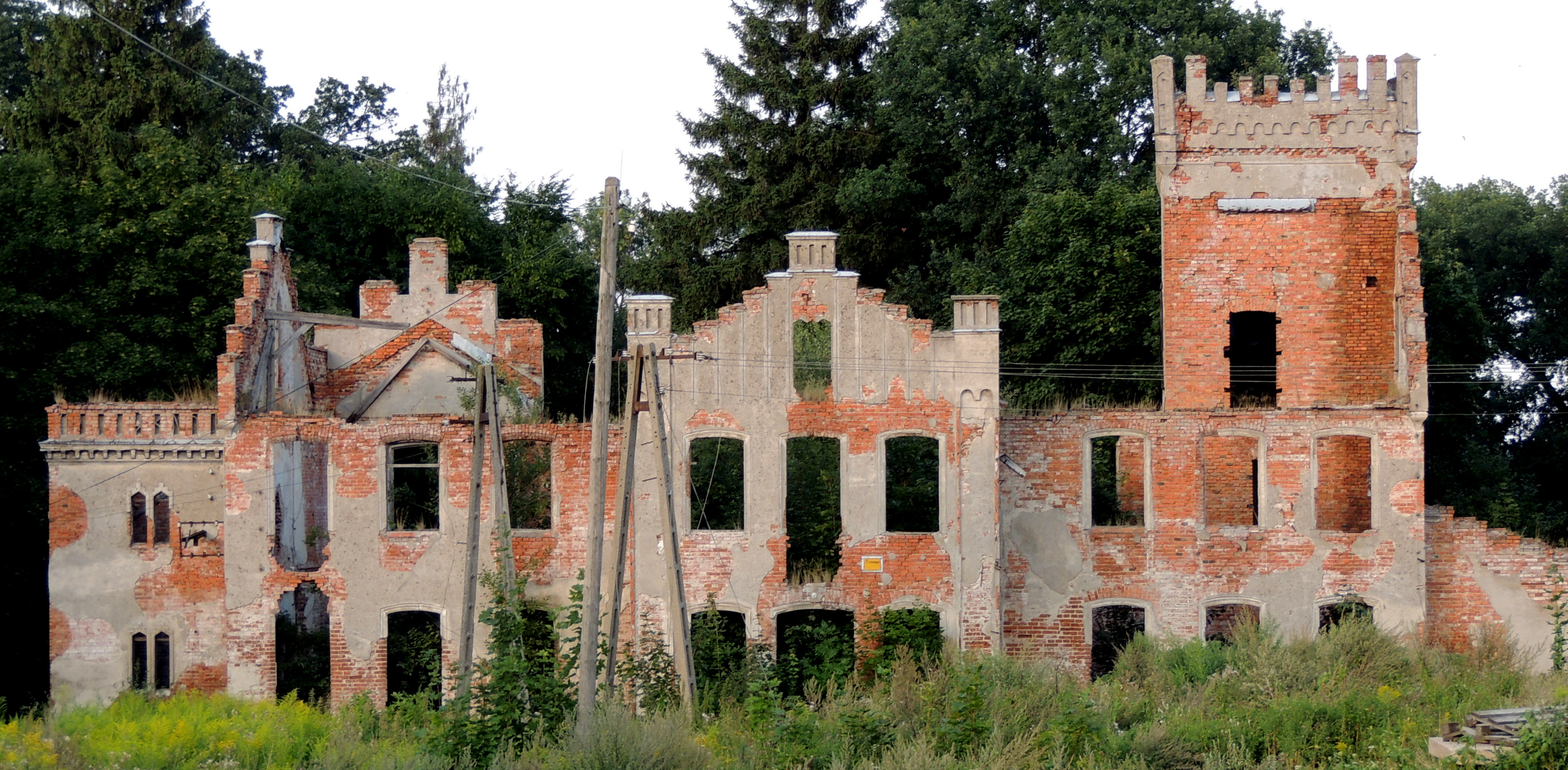 Rudłowo, pałac (ruina), 2 poł. XIX